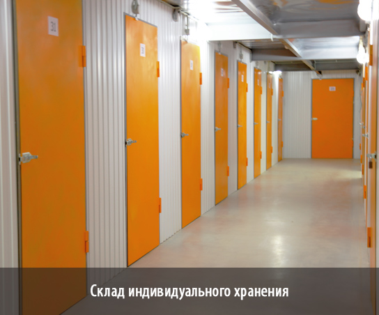 Вид склада индивидуального хранения изнутри.